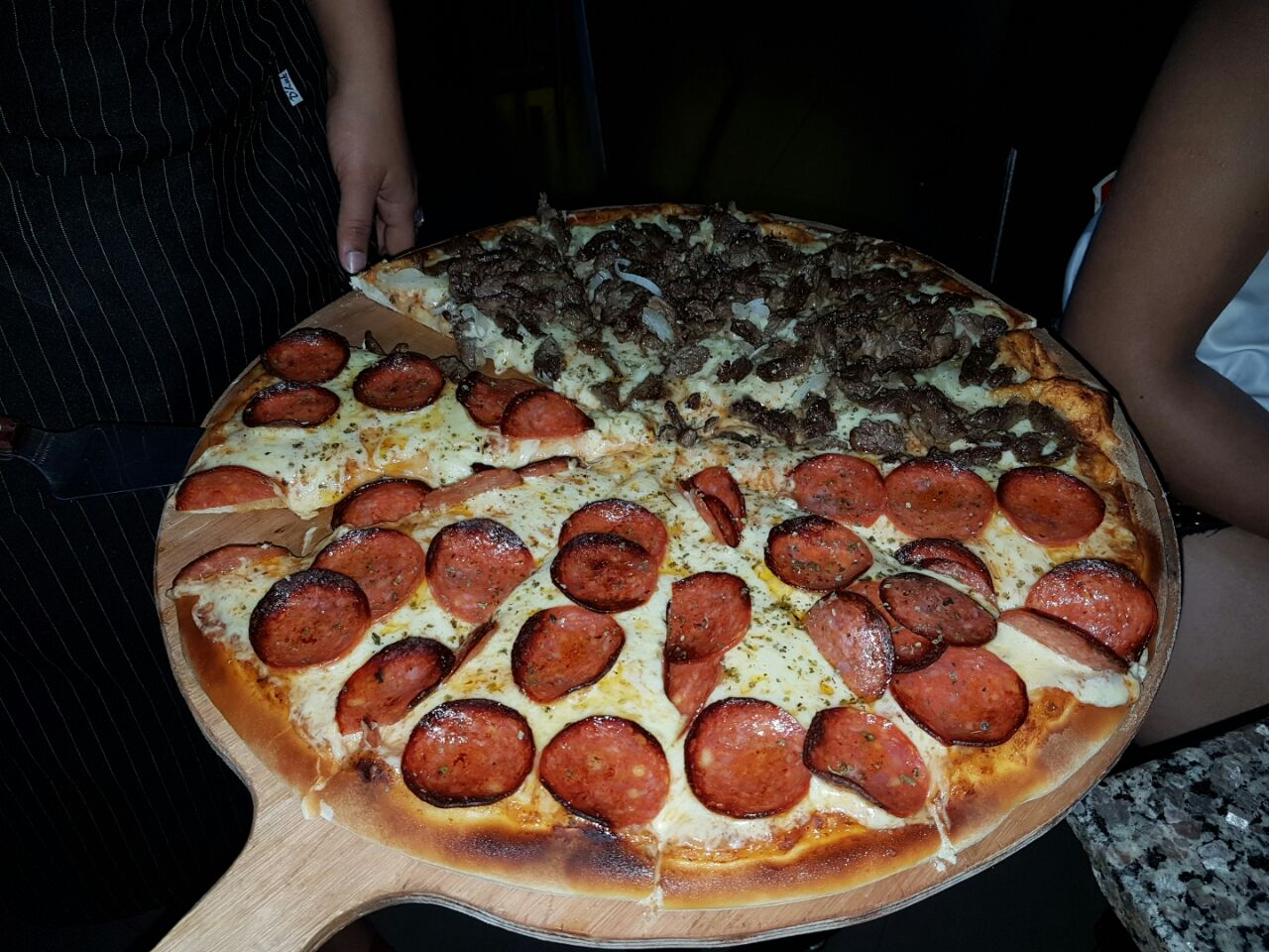 Segredos da Pizza